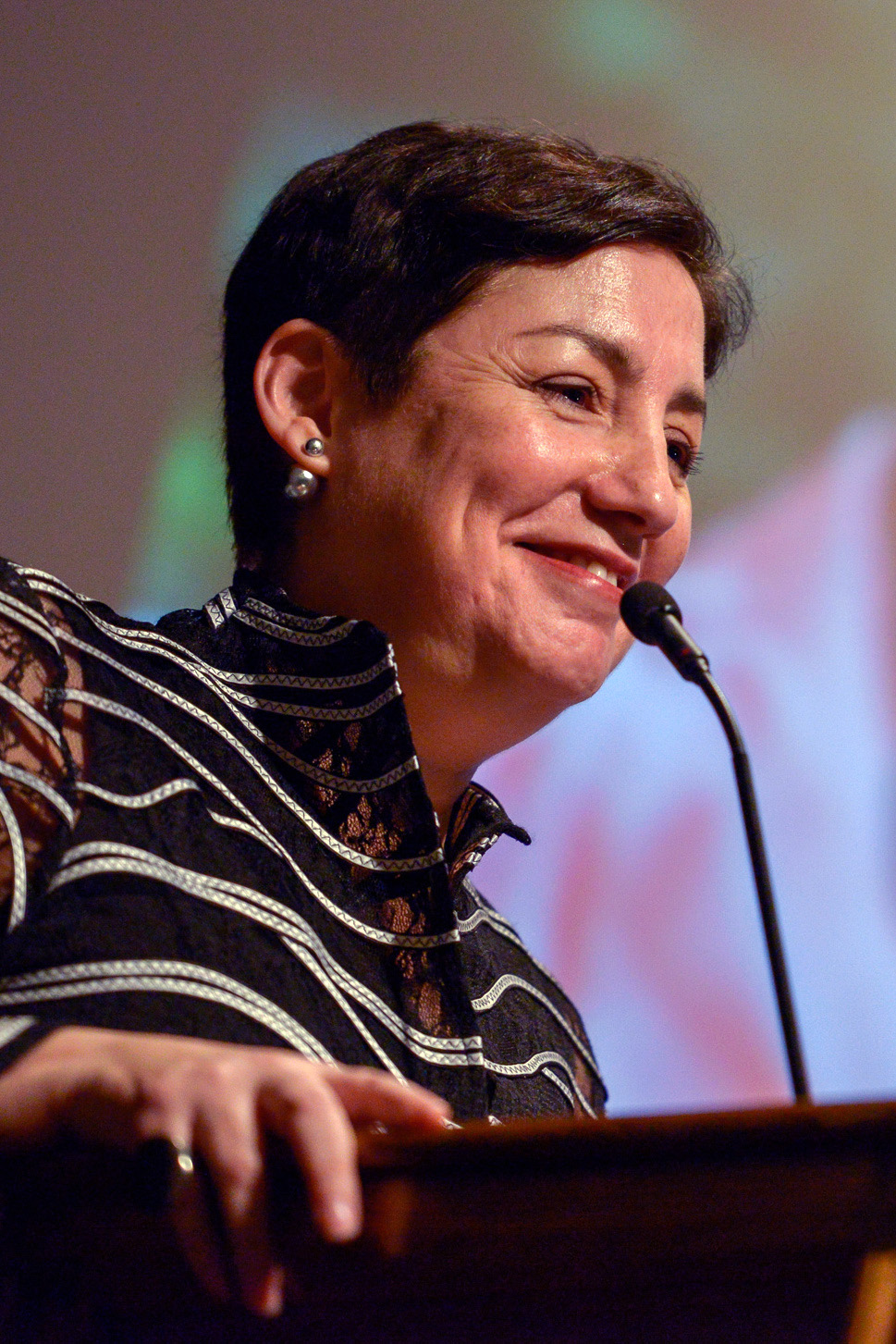 Ministro Díaz asiste a la premiaciín de la periodista Beatriz Sanchez, quien recibe el Premio Raquel Correa